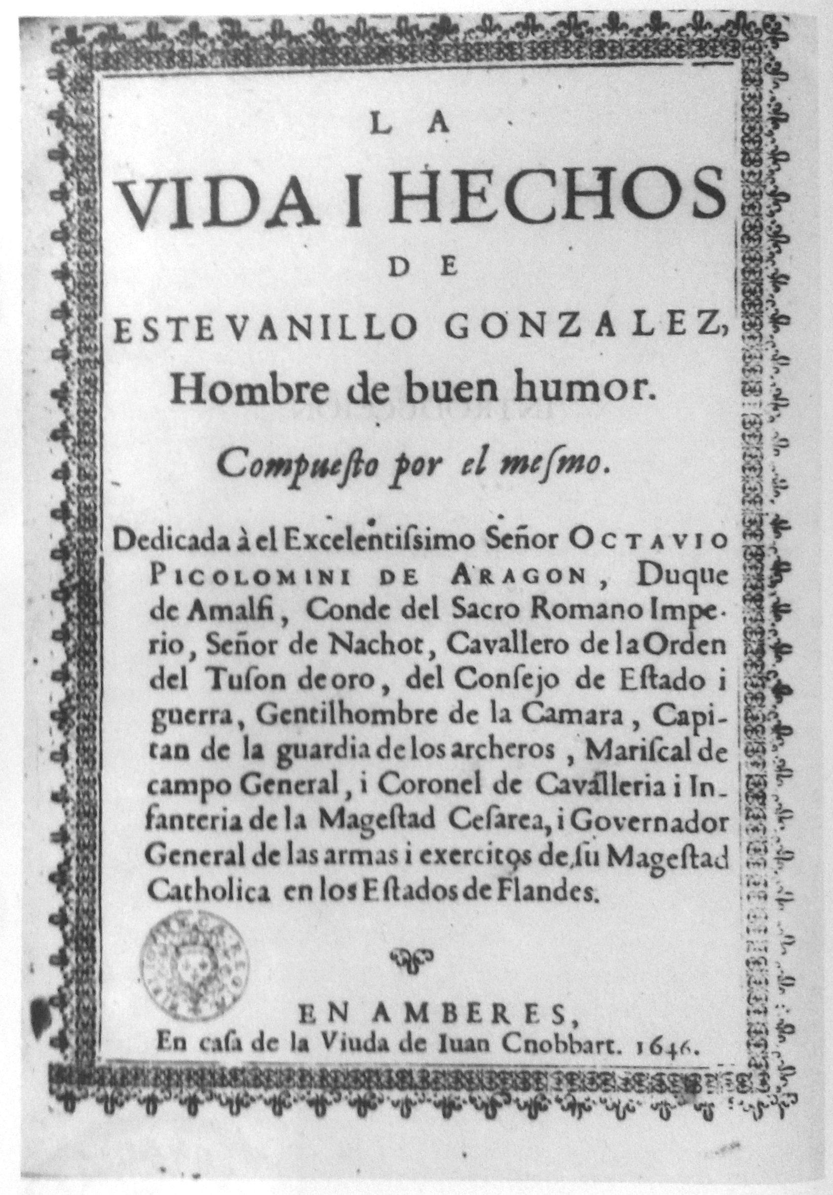 Portada da primeira edición de Estebanillo González (1646), co seguinte texto: LAVIDA I HECHOSDE ESTEVANILLO GONZALEZ,HOMBRE DE BUEN HUMOR.COMPUESTO POR EL MESMO.Dedicada à el Excelentissimo Señor OCTAVIOPICOLOMINI DE ARAGON, Duquede Amalfi, Conde del Sacro Romano Impe·rio, Señor de Nachot, Cavallero de la Ordendel Tuson de oro, del Consejo de Estado iguerra, Gentilhombre de la Camara, Capi-tan de la guardia de los archeros, Mariscal decampo General, i Coronel de Cavalleria i In-fanteria de la Magestad Cesarea, i GovernadorGeneral de las armas i exercitos de su MagestadCatholica en los Estados de Flandes.---EN AMBERES,En casa de la Viuda de Iuan Cnobbart, 1646.